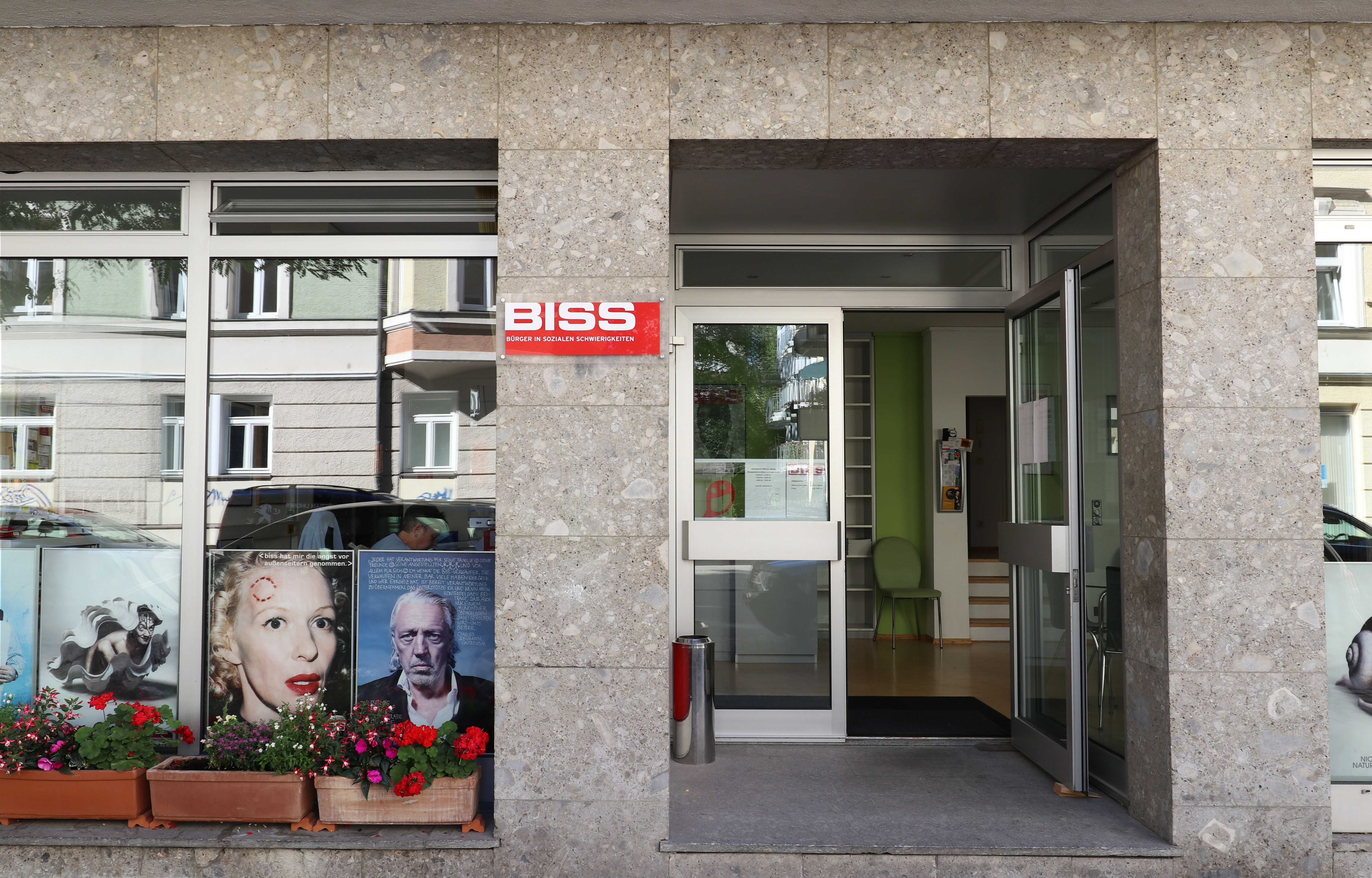 Eingang der Redaktion BISS in der Metzstraße 29 in Haidhausen.